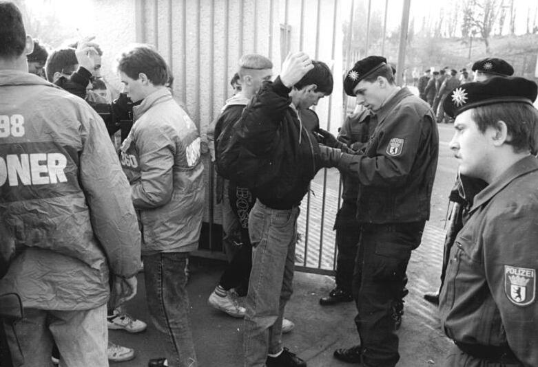 ADN-ZB-Settnik-10.11.90-cmv- Berlin:Fußball-Oberliga- FC Berlin - HFC Chemie 0:0- Um erneute Provokationen und Krawallen in Zusammenhang mit einem Oberligaspiel zu vermeiden, hatten Polizeikräfte des Friedrich-Ludwig-Jahn-Stadion weiträumig abgesichert. Am Eingang wurden stichprobenartig Leibesvisitationen vorgenommen.